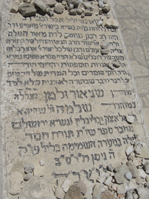 קברו של הרב שניאור זלמן פראדקין בחלקת חב"ד ג' בהר הזיתים